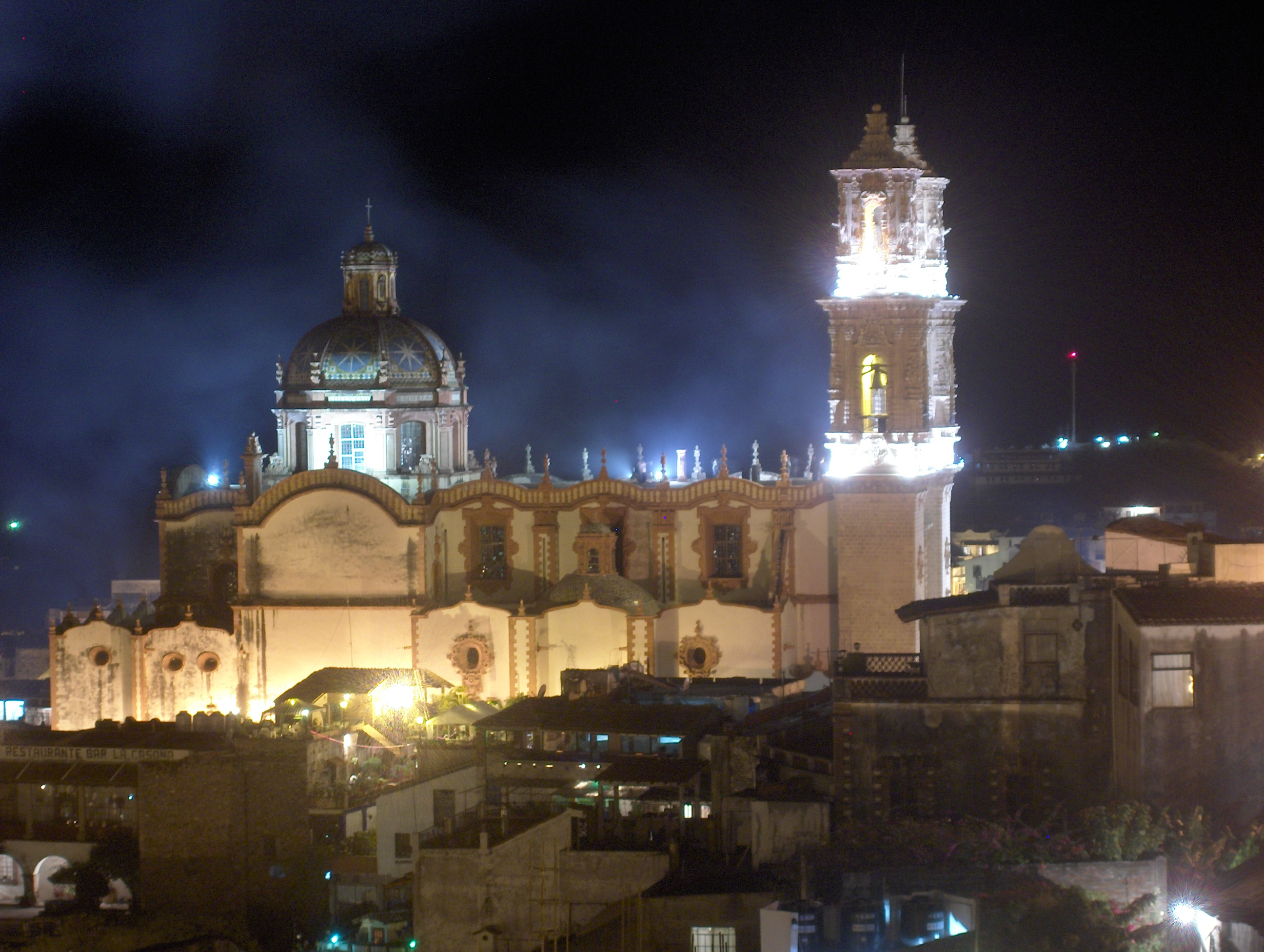 Templo de Santa Prisca de Taxco